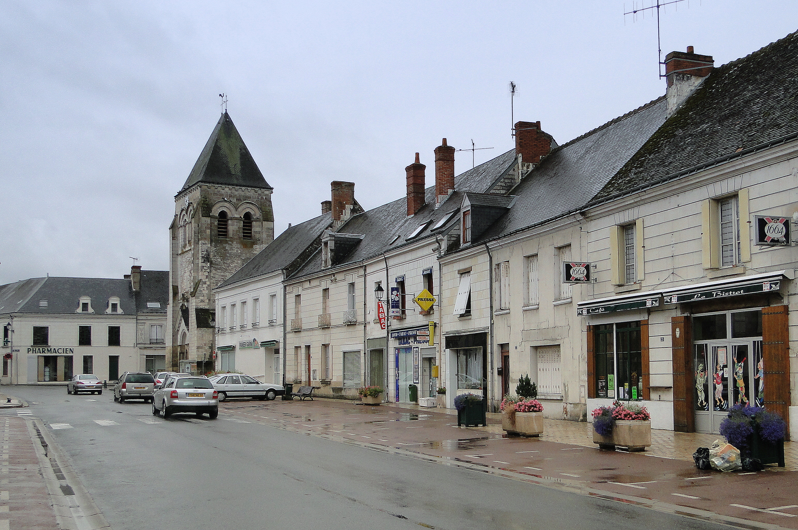 Centre ville de Manthelan - rue principale (Indre-et-Loire)